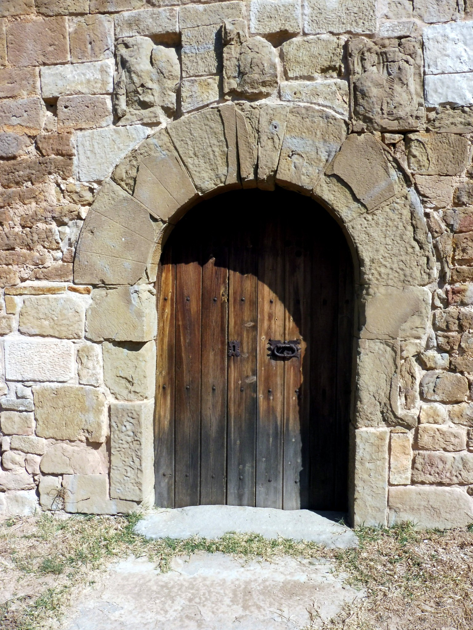 Santa Magdalena dels Arquells (Oliola): portal